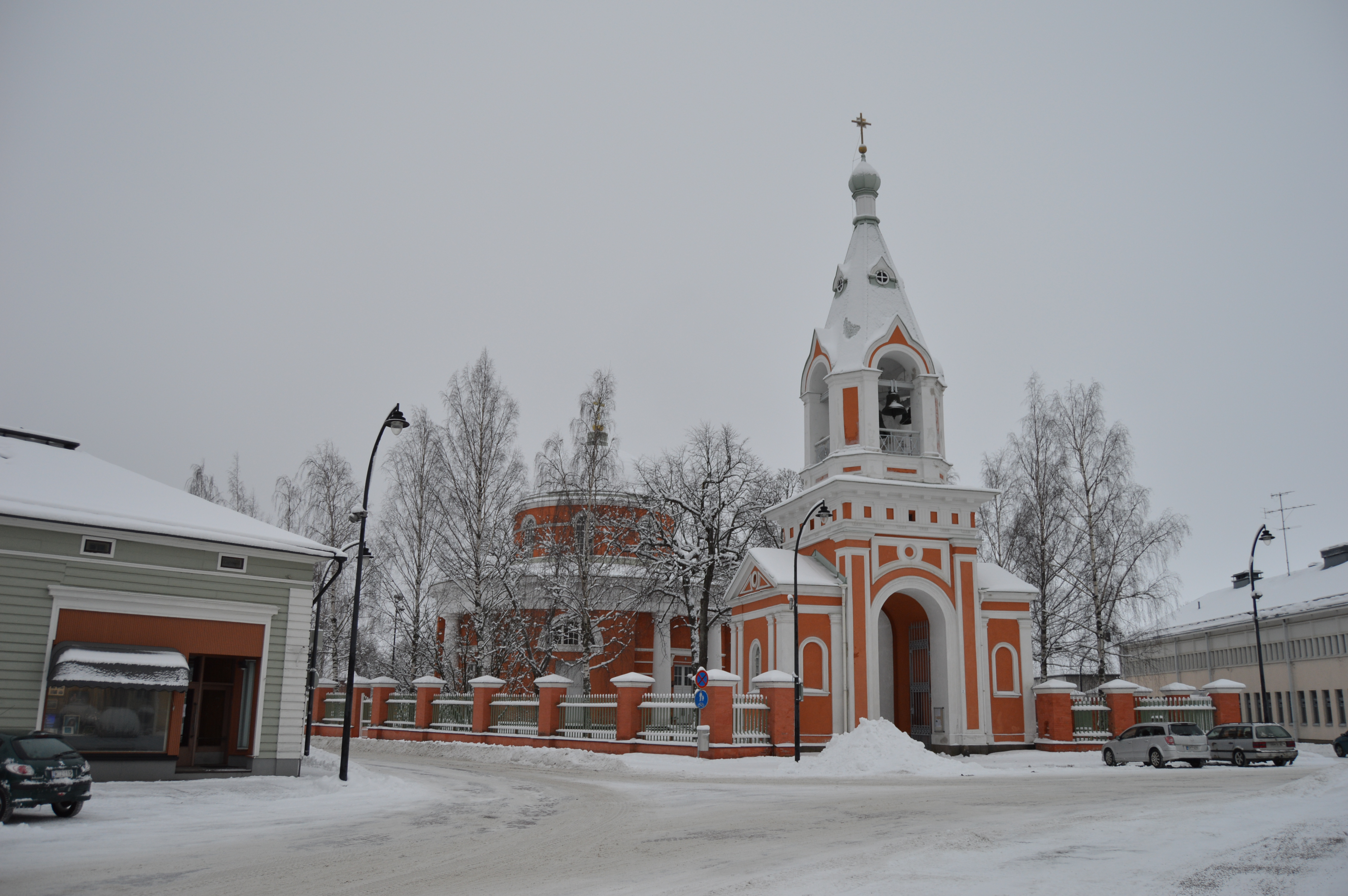 Haminan ortodoksinen Pietarin ja Paavalin kirkko tammikuussa 2019.